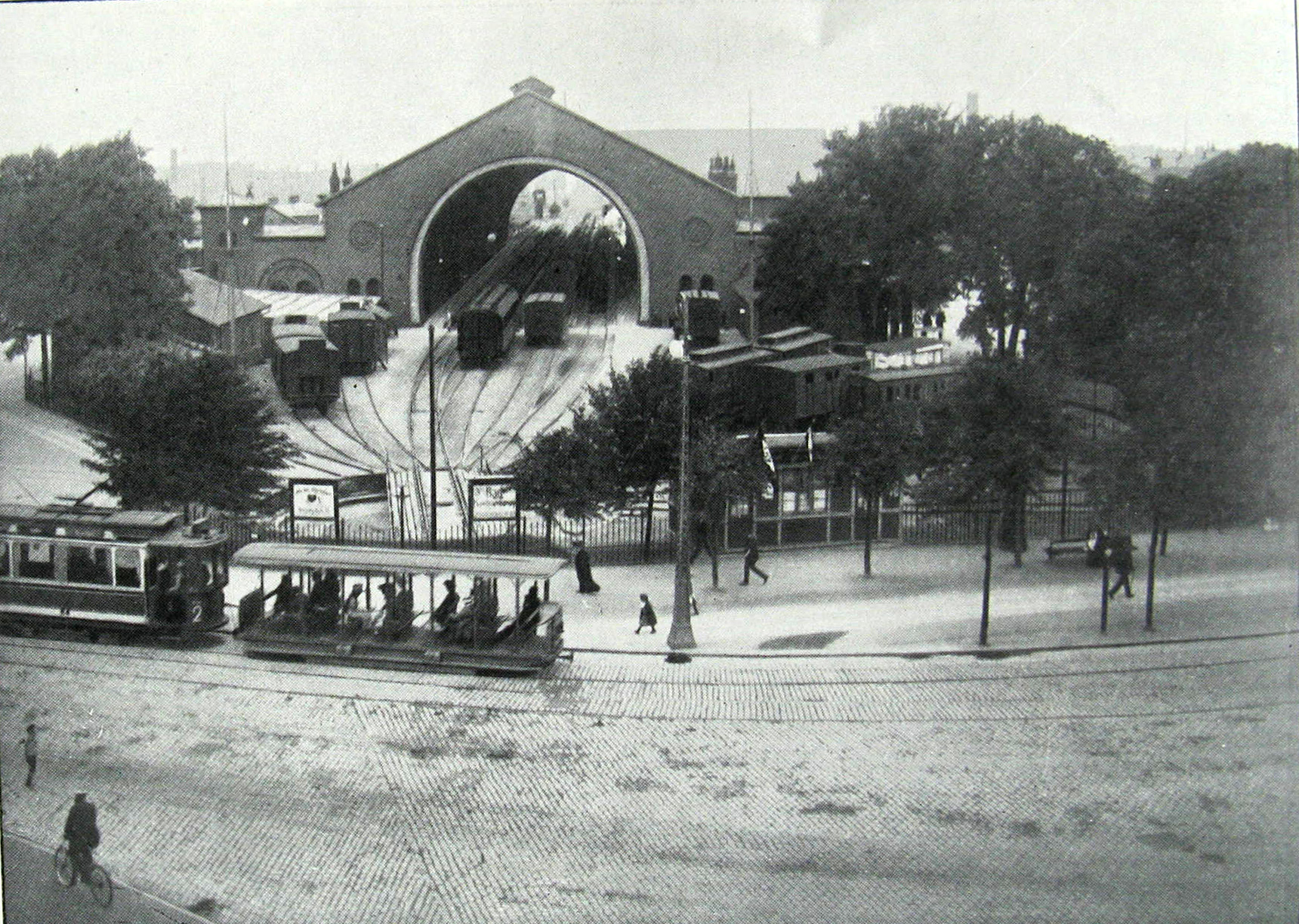 Københavns anden banegård set fra Vesterbrogade